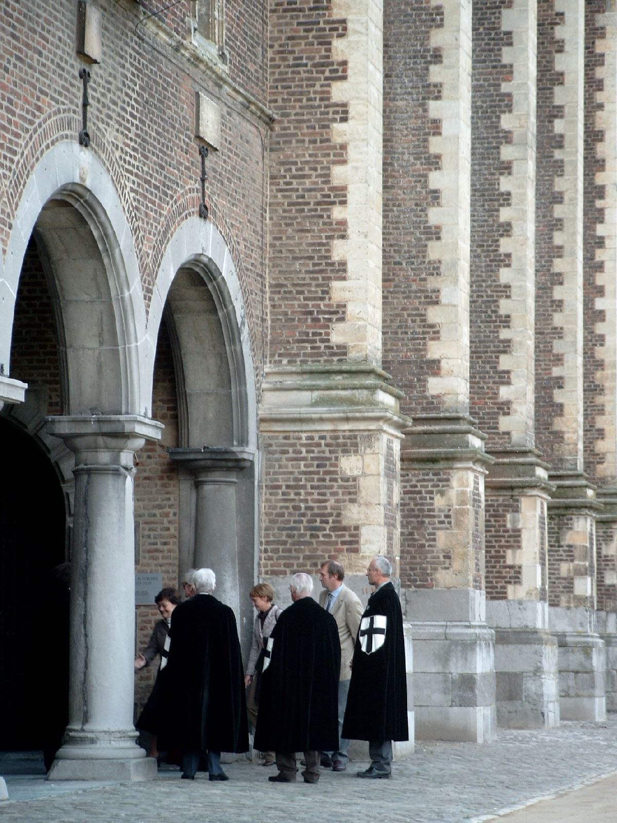 Leden van de Duits Orde in de Landcommanderij Alden Biesen te Bilzen (België)